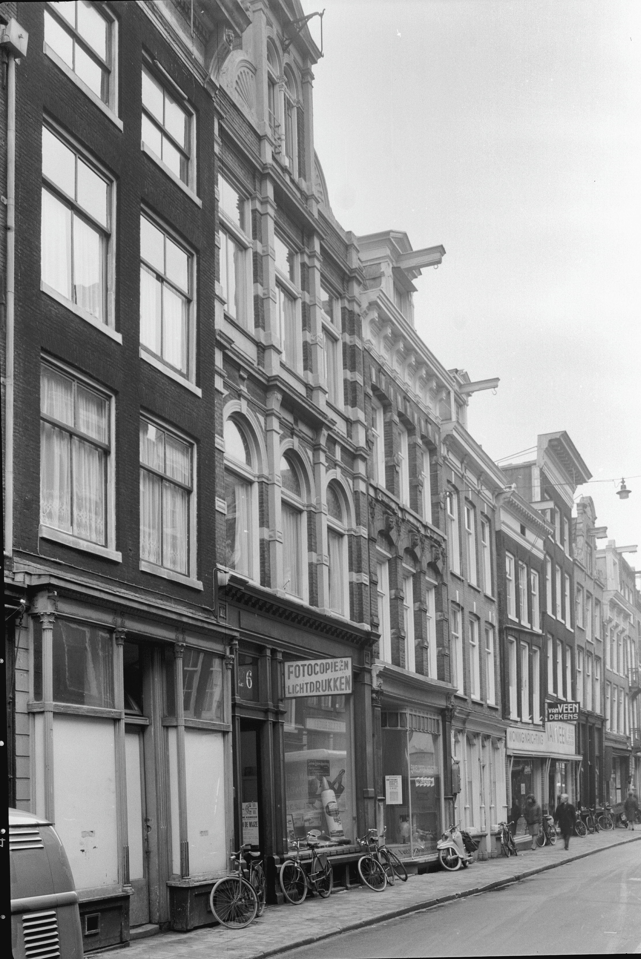 voorgevels This is an image of rijksmonument number 1464 This is an image of rijksmonument number 1465 This is an image of rijksmonument number 1466